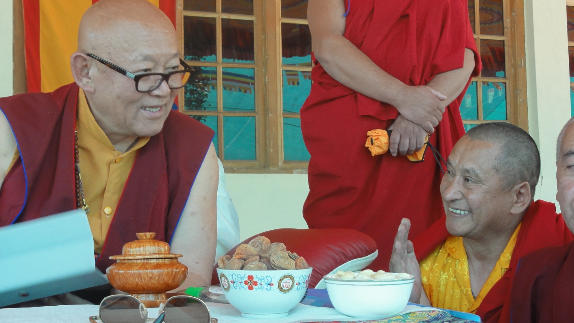 Sa Sainteté Chesang Rinpoché et Konchog Tharchin Rinpoché|Le Vénérable Tharchin Rinpoché